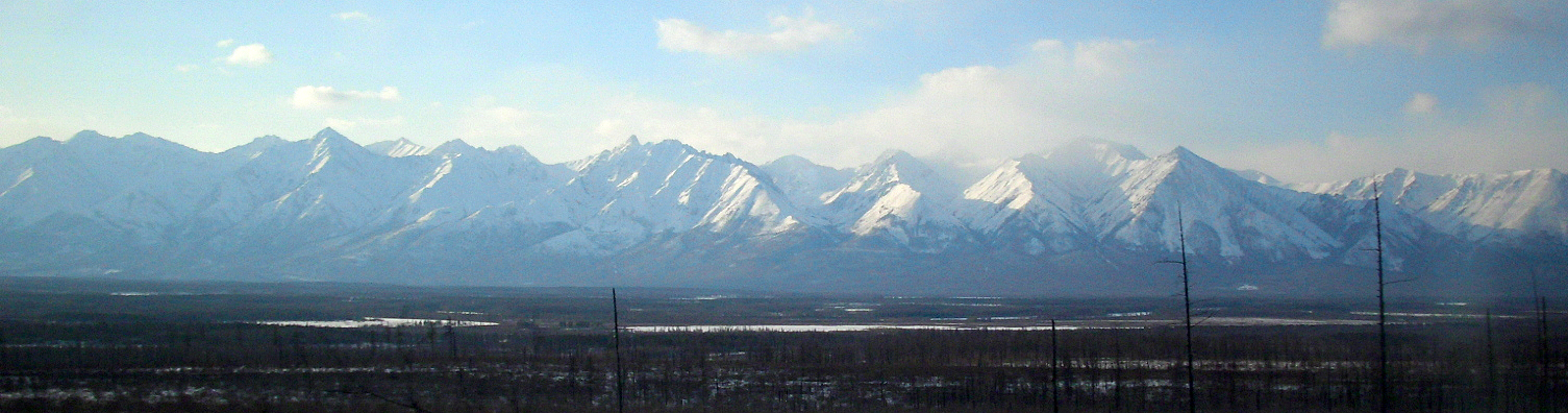 Кодар